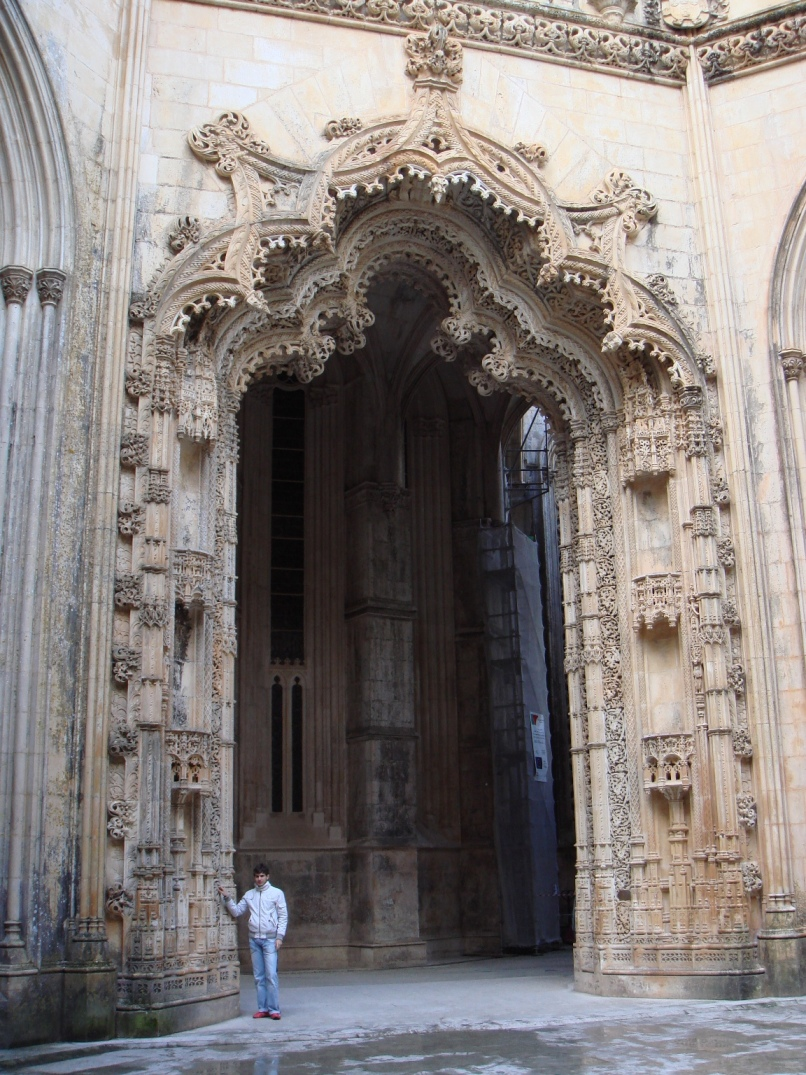 Acceso a las Capillas Inacabadas del Monasterio de Batalha